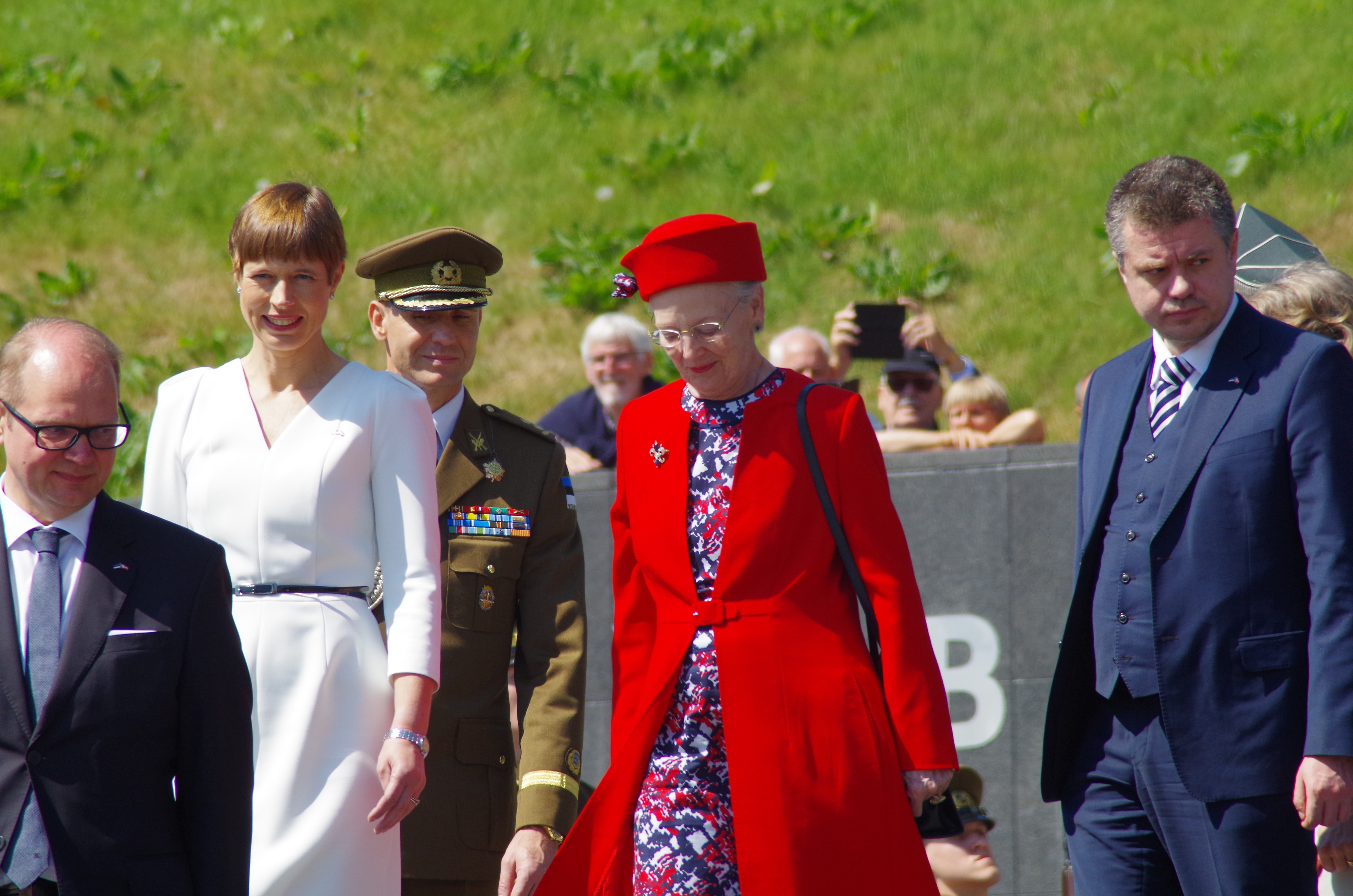 Taani kuninganna Margrethe II koos Eesti poliitikutega Vabaduse väljakul Võidusamba jalamil